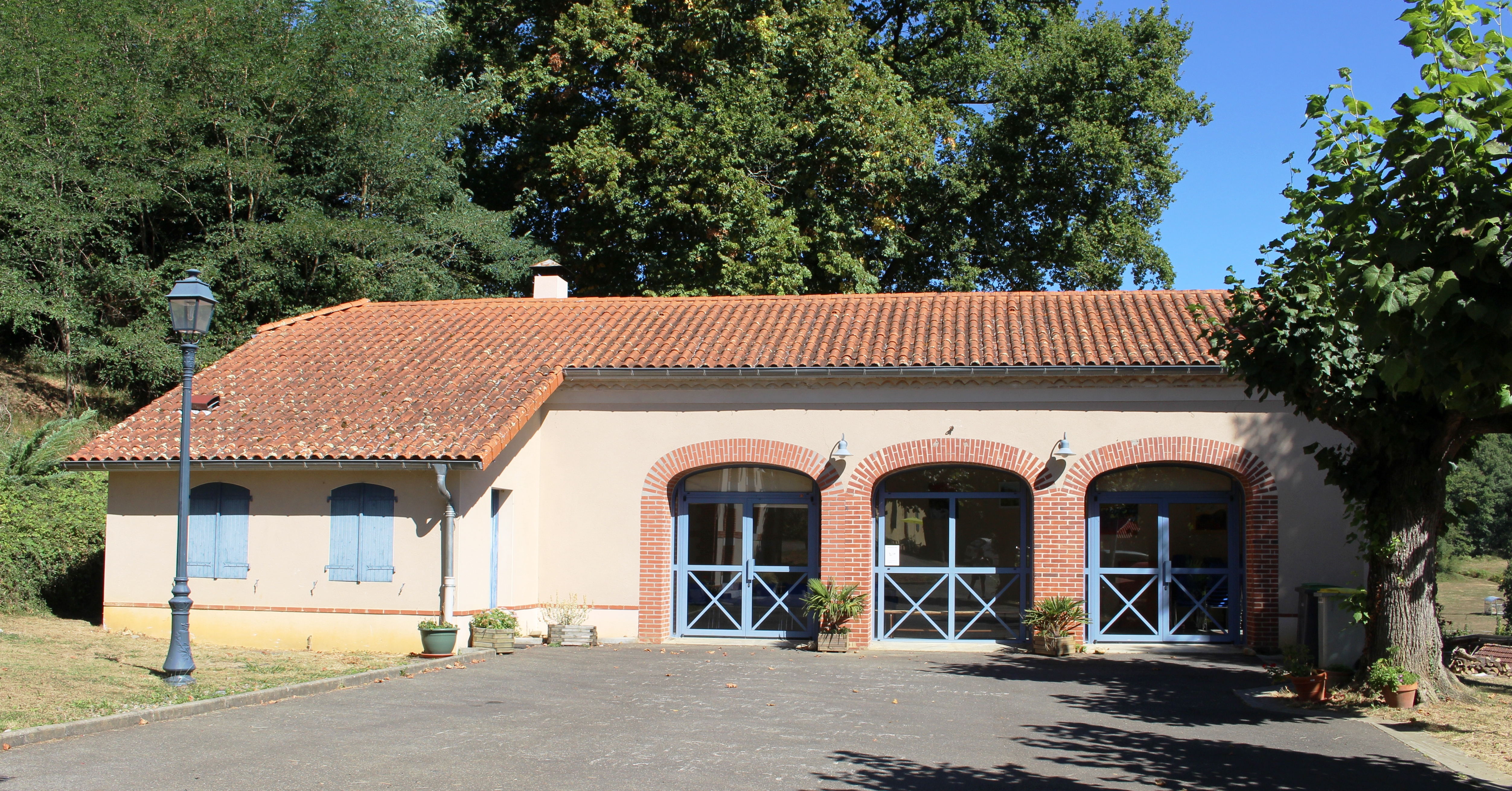 Salle des fêtes de Villefranque (Hautes-Pyrénées)